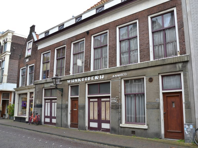 Hogewoerd 59-63 te Leiden